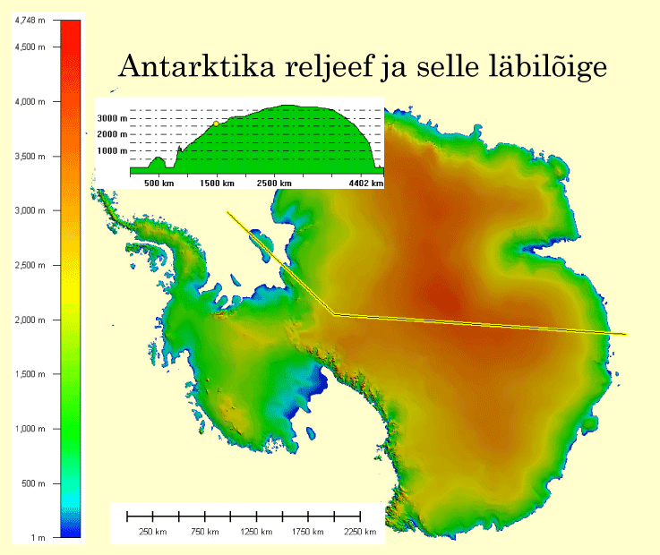 Antarktise reljeef hüpsomeetrilises värvingus (USGS-i andmed)